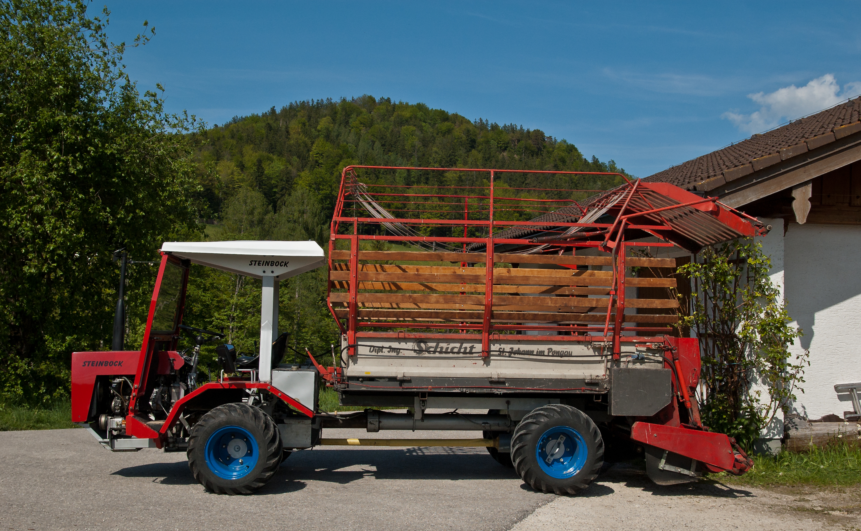 Steinbock Bergtraktor mit Mercedes Motor OM 616; Ladenwagenaufbau mit Pickup, gesehen im Berchtesgadener Land